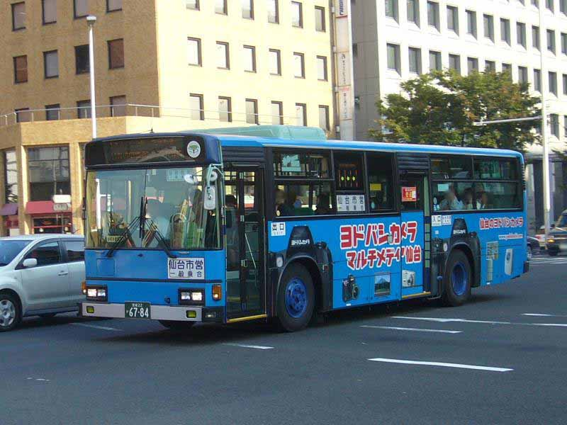 登録番号：宮城22か67-84 仙台市交通局所属 日野・ブルーリボン U-HU2MMAA